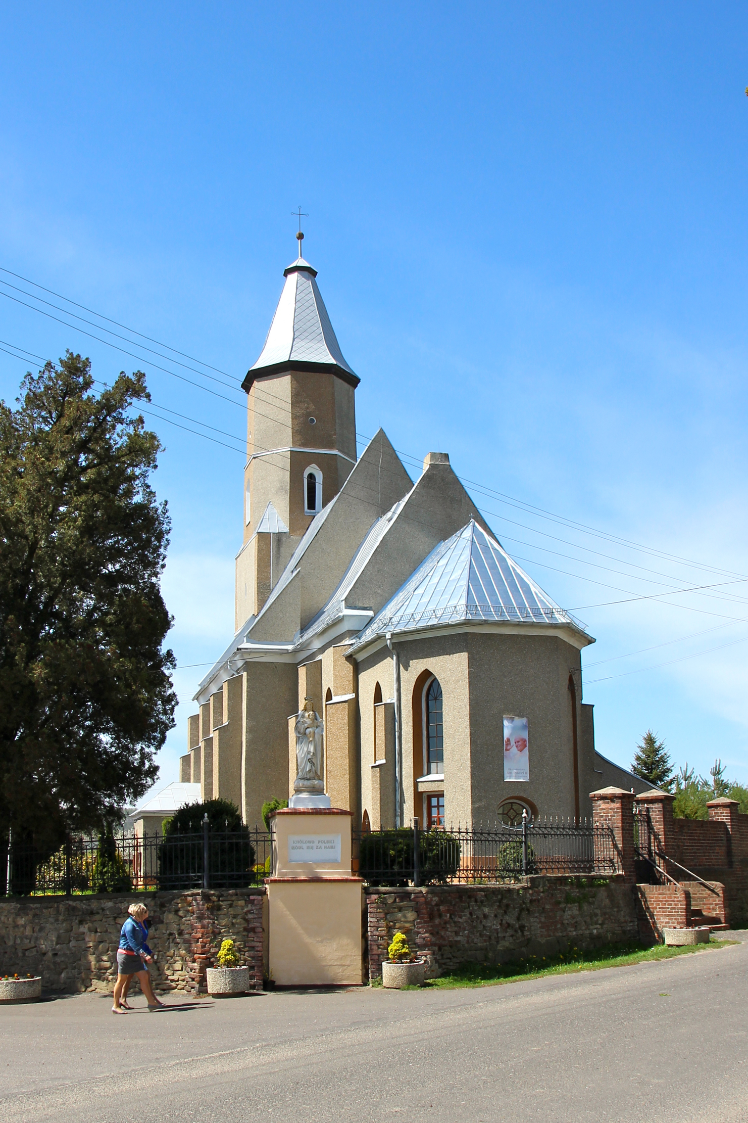 Bliszczyce - kościół parafialny p.w. św. Katarzyny, k. XVII, 1672, 1906 (zabytek nr 49 (97/48) z 25.11.1948).